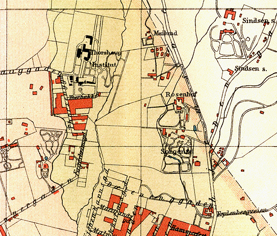 Kart over Rosenhoff, Kristiania, 1887